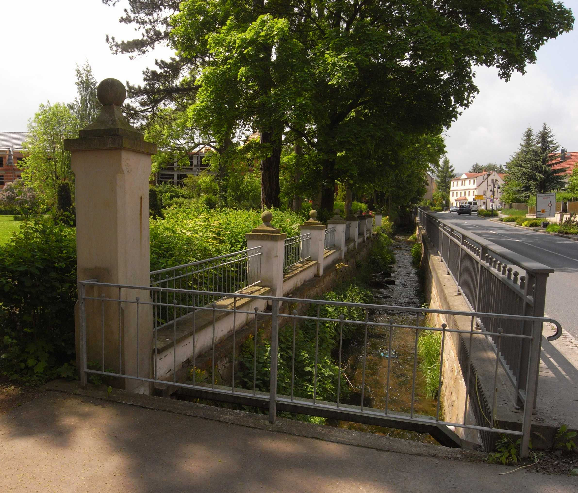 Kreischa, Quohrener Bach am Park (Sachsen, Deutschland)